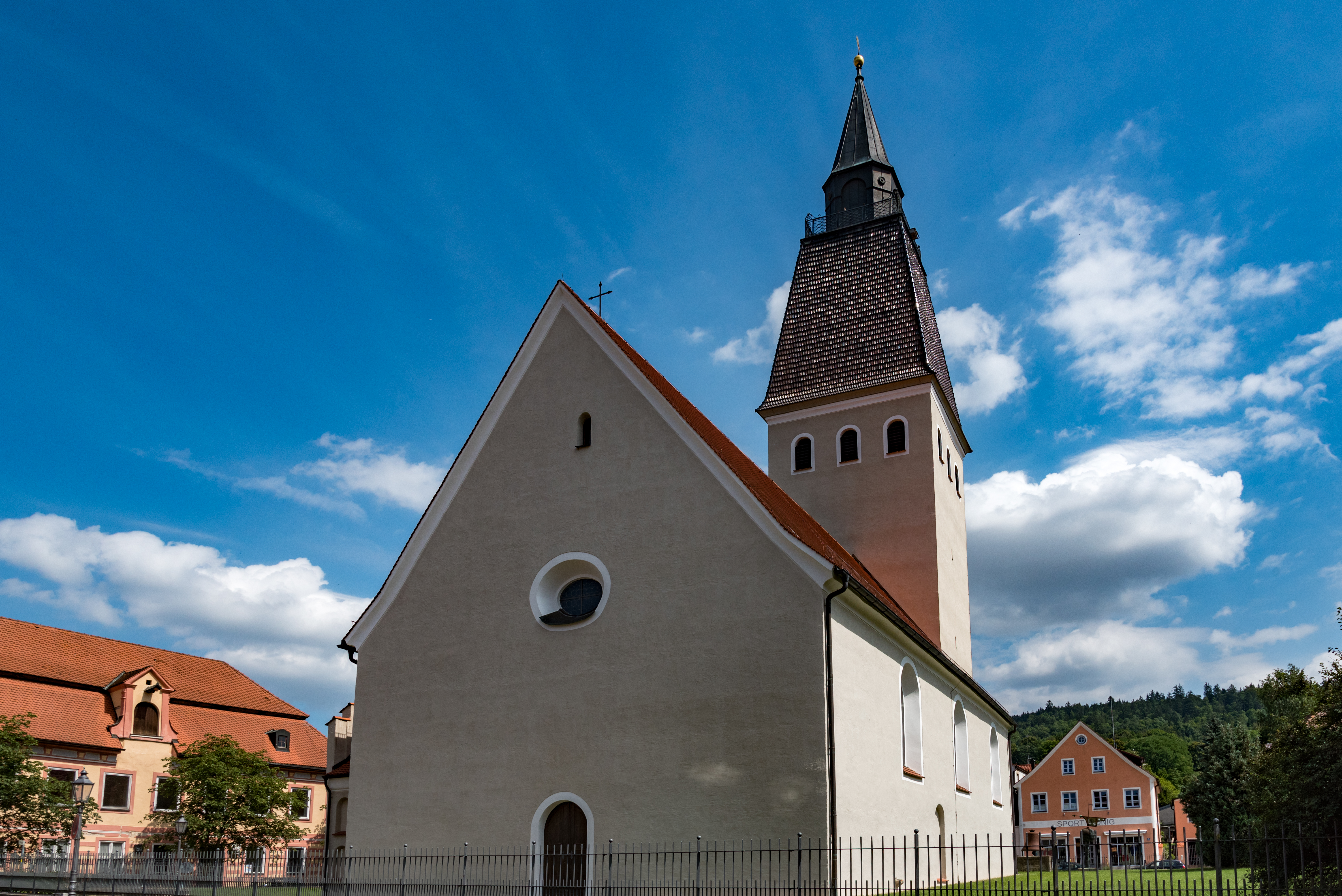 Berching, St.-Lorenz-Straße 2, Kirche St. Lorenz